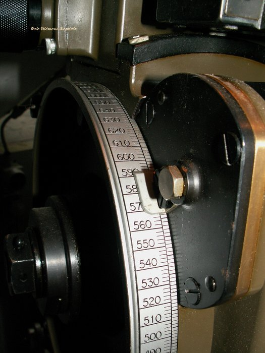 Elevation der Kanone